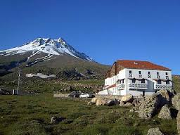 Hasandağı ve Turistik Dağ Evi